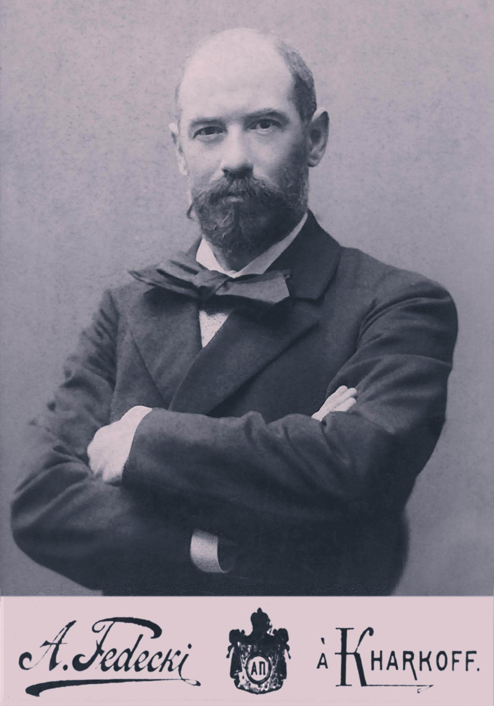 Konstanty Gorski (1859-1924) - fotografia portretowa wykonana przez Alfreda Fedeckiego